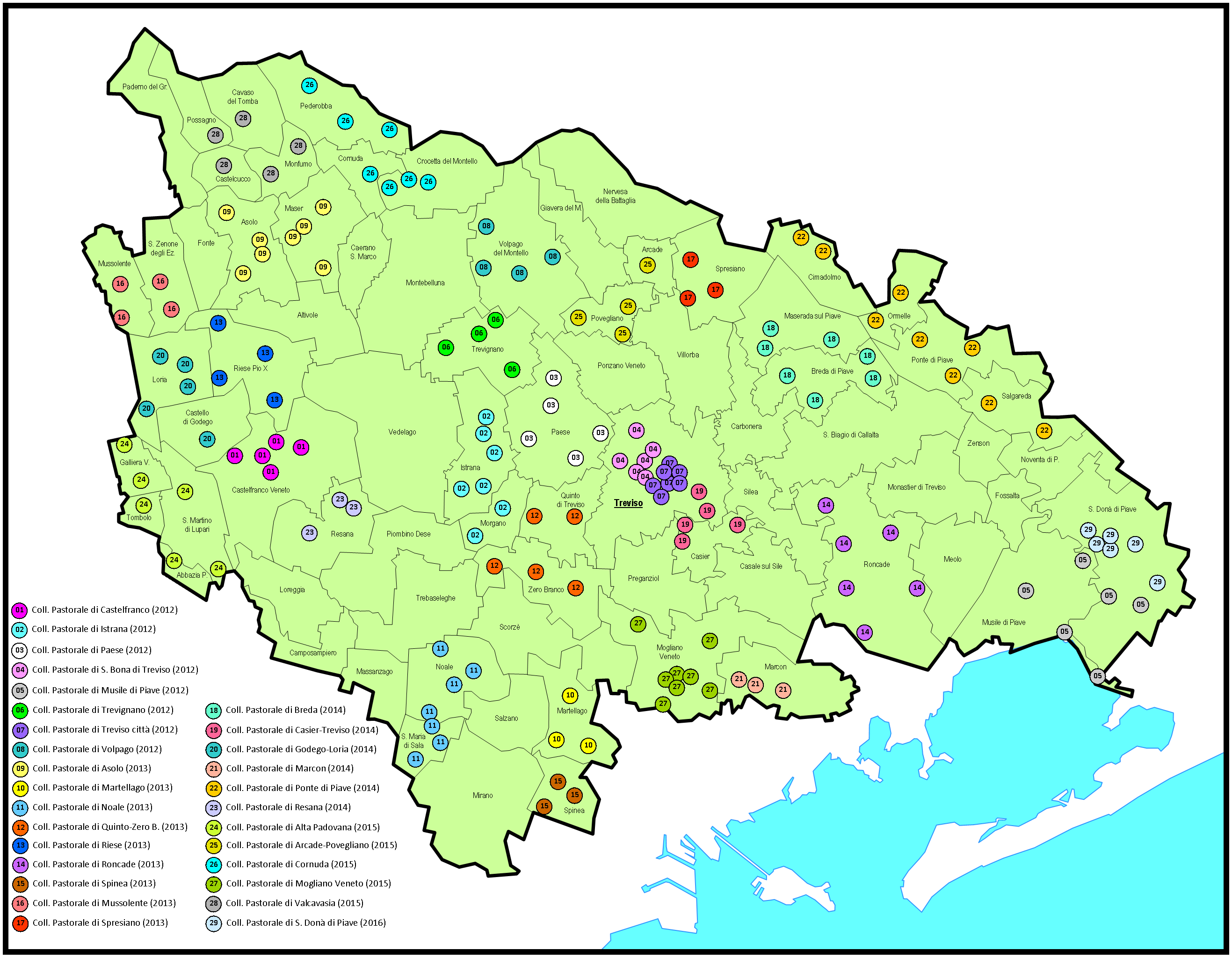 Mappa delle Collaborazioni Pastorali della Diocesi di Treviso (Novembre 2016)